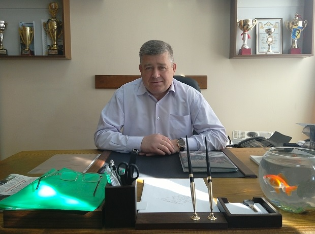 Липовецький міський голова